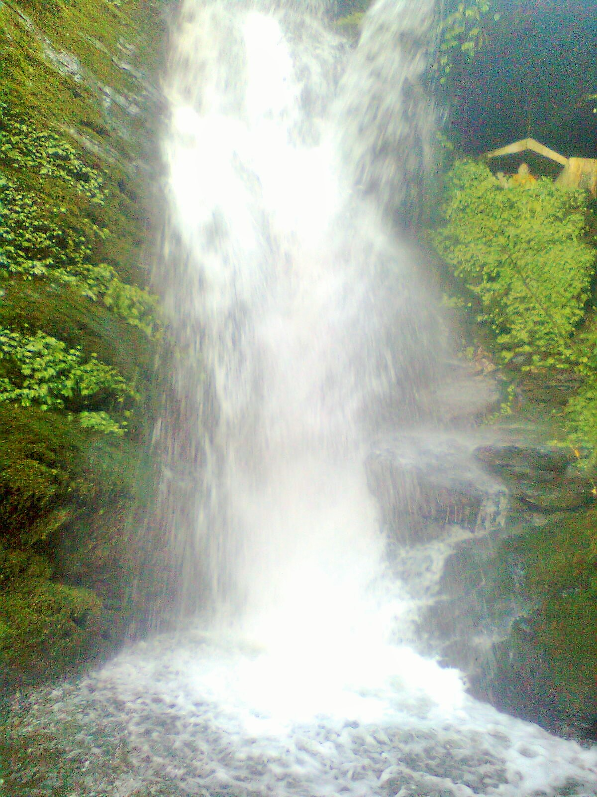 नेपाली: आँधीखोलाको मुहान अन्धाअन्धी